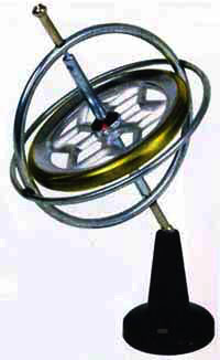 ไจโรสโคป